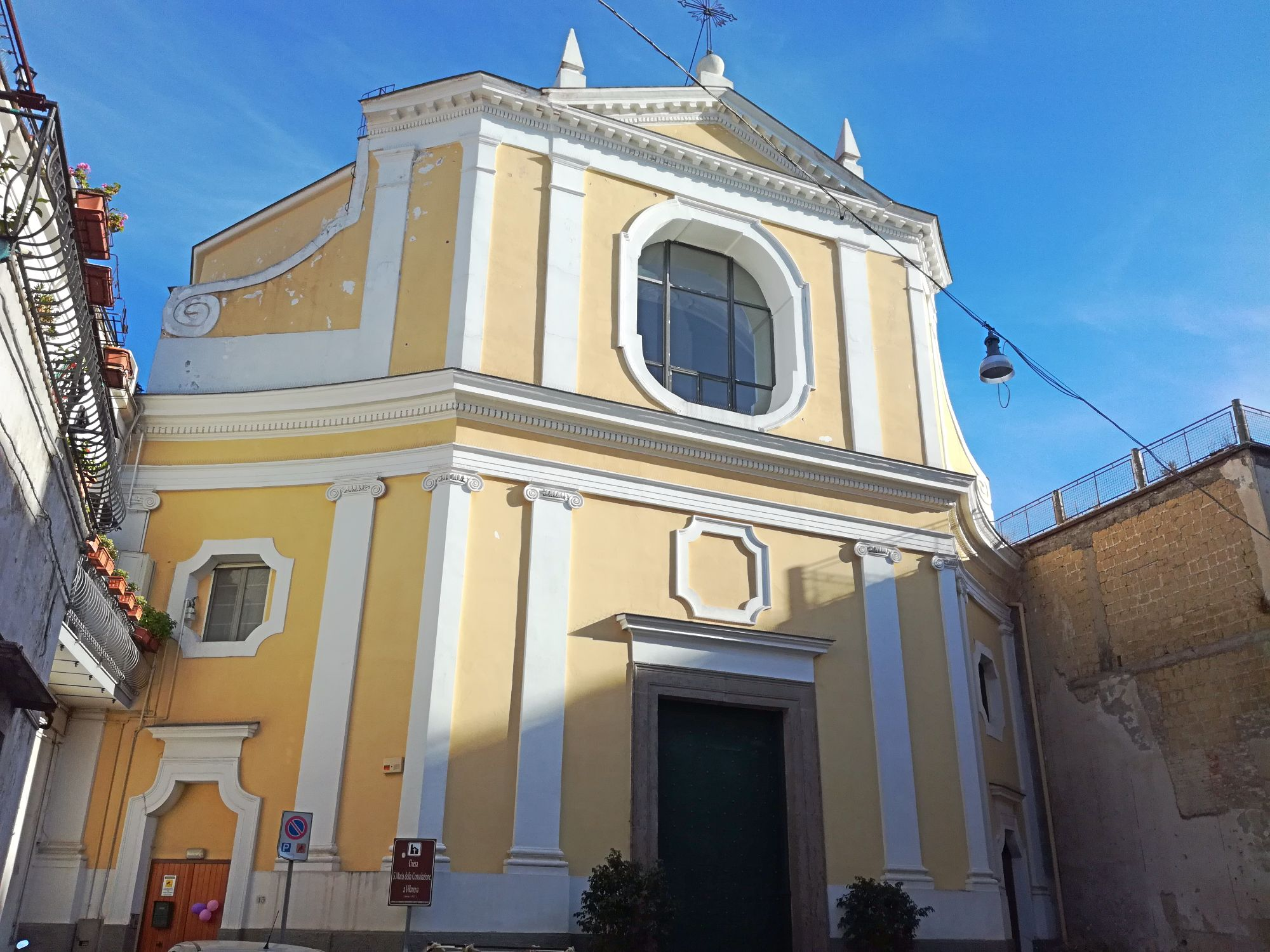 Chiesa di Santa Maria della Consolazione a Villanova (Napoli)